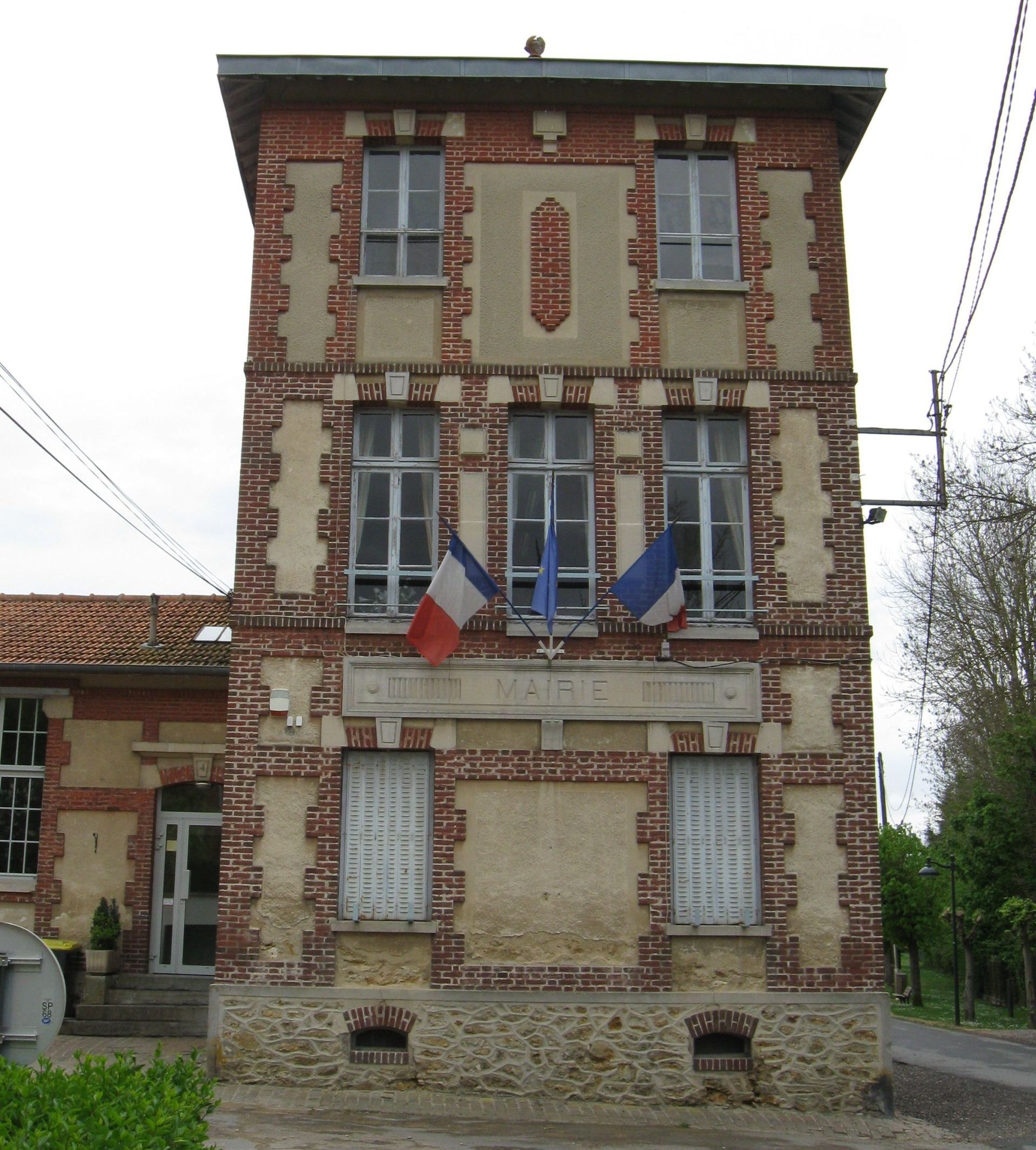 Mairie de Dammartin-sur-Tigeaux (Seine-et-Marne, région Île-de-France).